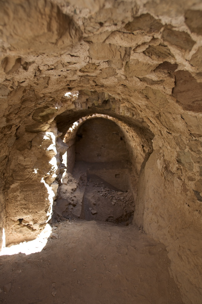 Ghez Ghale (aka Cala Ataperistan)